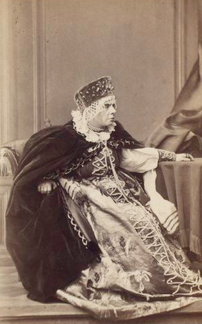 Юлия Николаевна Линская (1821-1871) — комическая артистка Александринского театра. (В роли Царской мамы в драме "Боярин Матвеев").